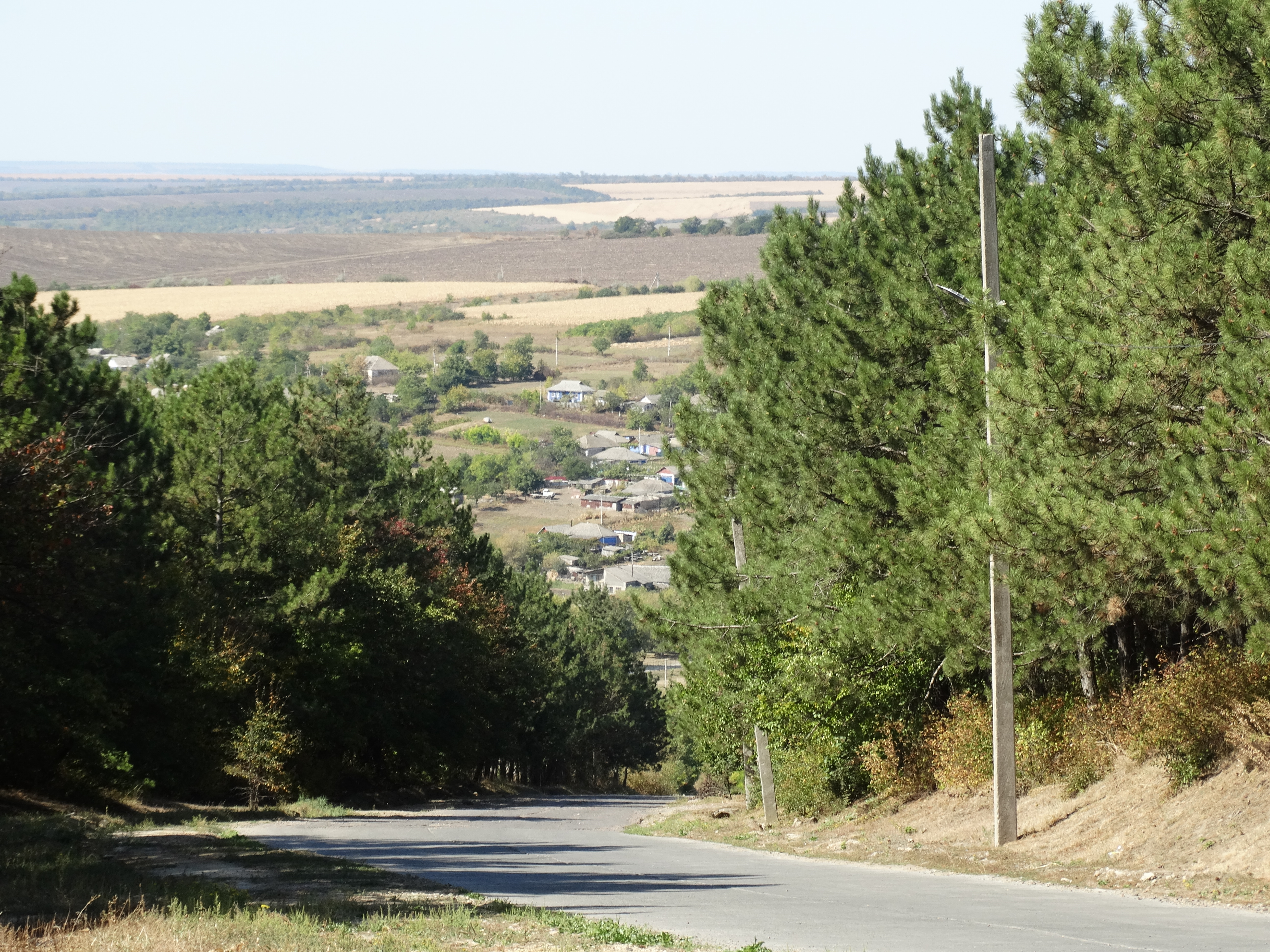 Вікіекспедиція на північ Одещини